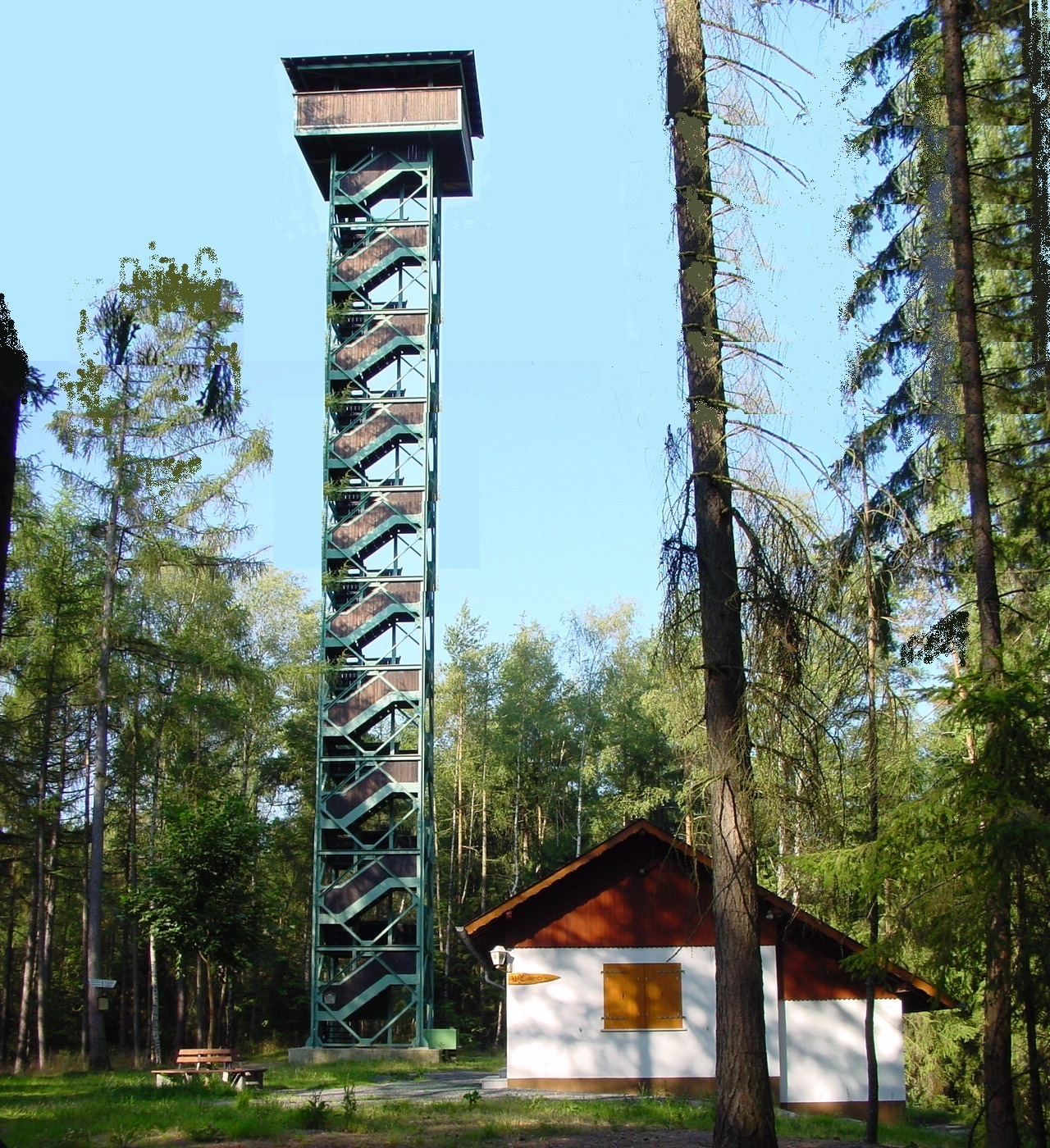 Neue Waldenfelswarte auf dem Kohlberg (Montage)